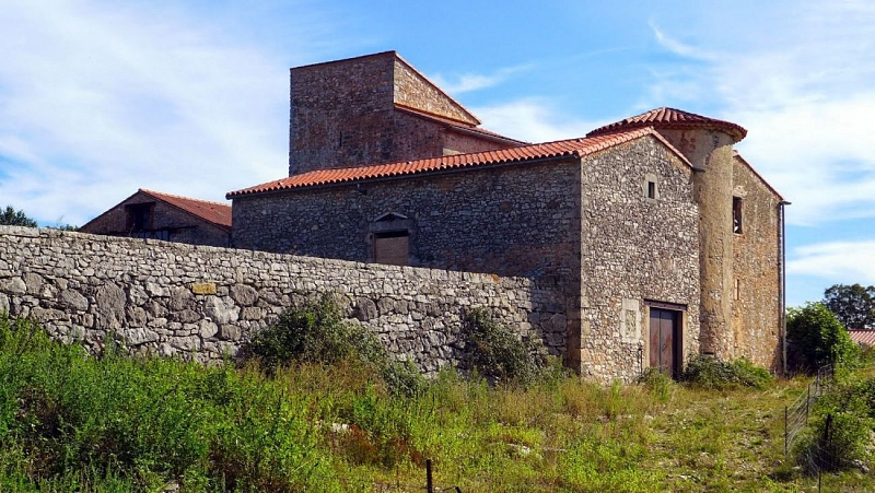 Ferme de la Prunarède dans la commune du Cirque de Navacelles